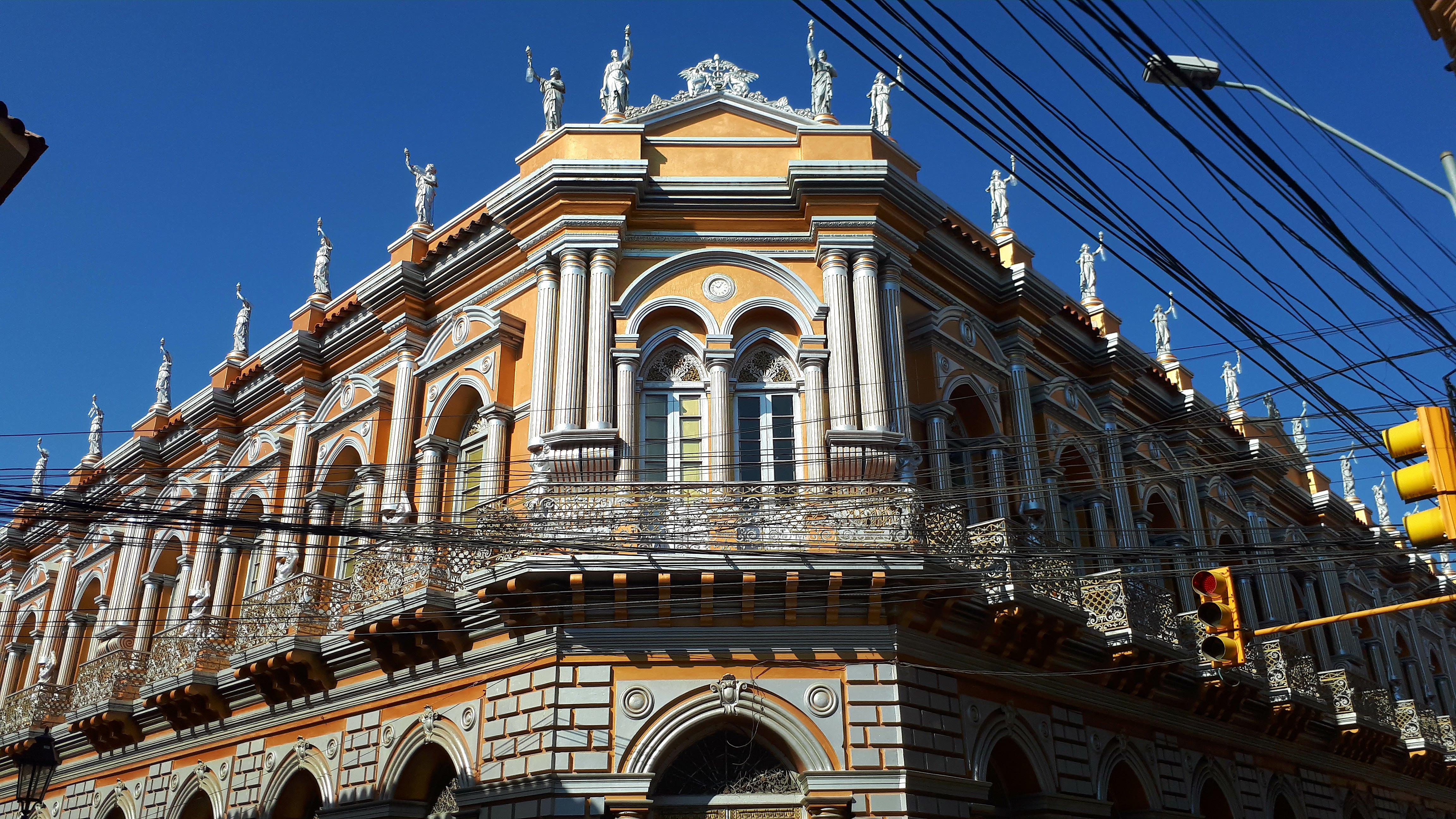 Face avant de la Casa Dorada - Tarija, Bolivie